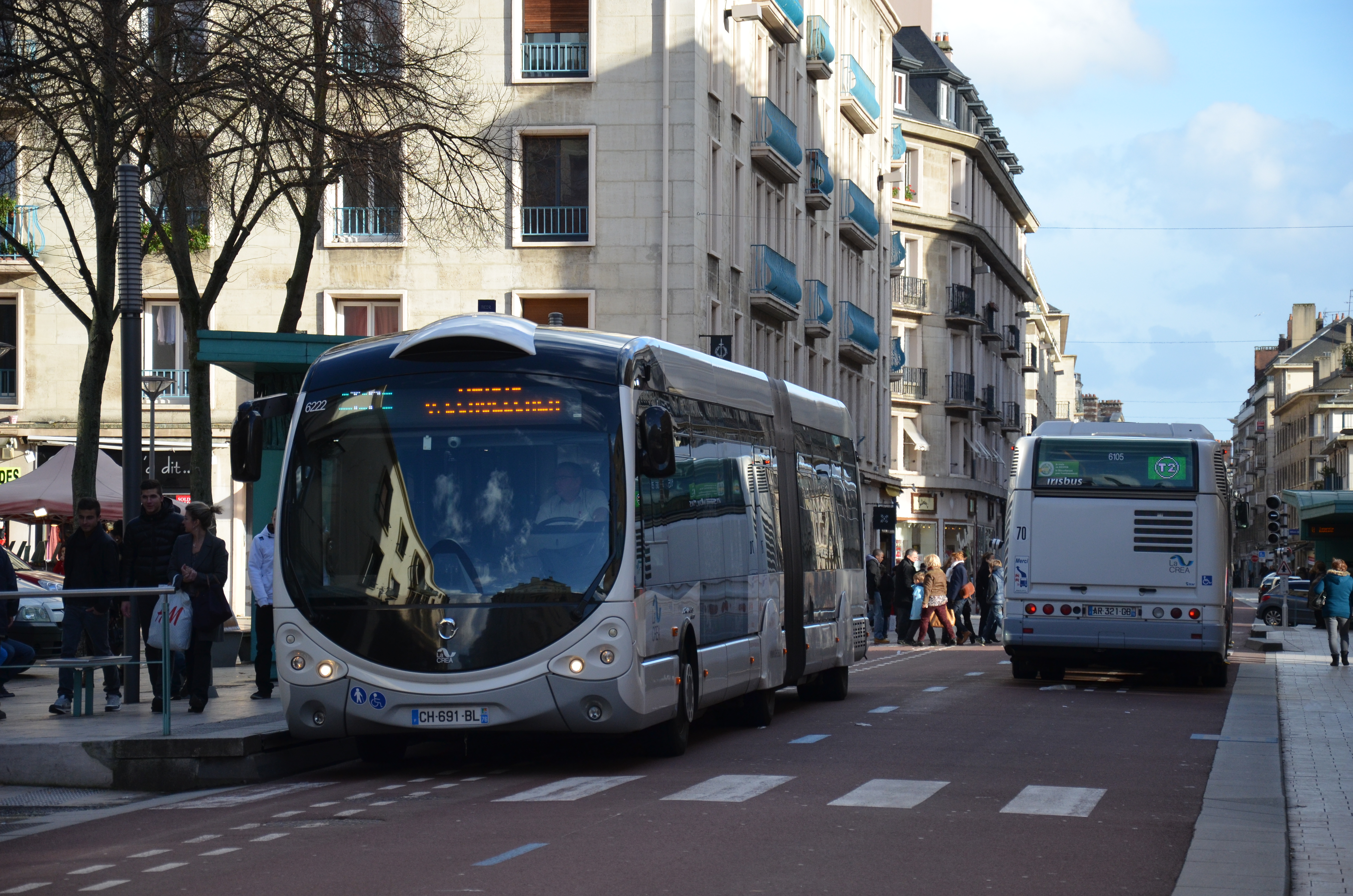 Irisbus Crealis Neo 18 n°6222 près de l'arrêt Cathédrale sur la ligne T2 TEOR, du réseau ASTUCE de Rouen.